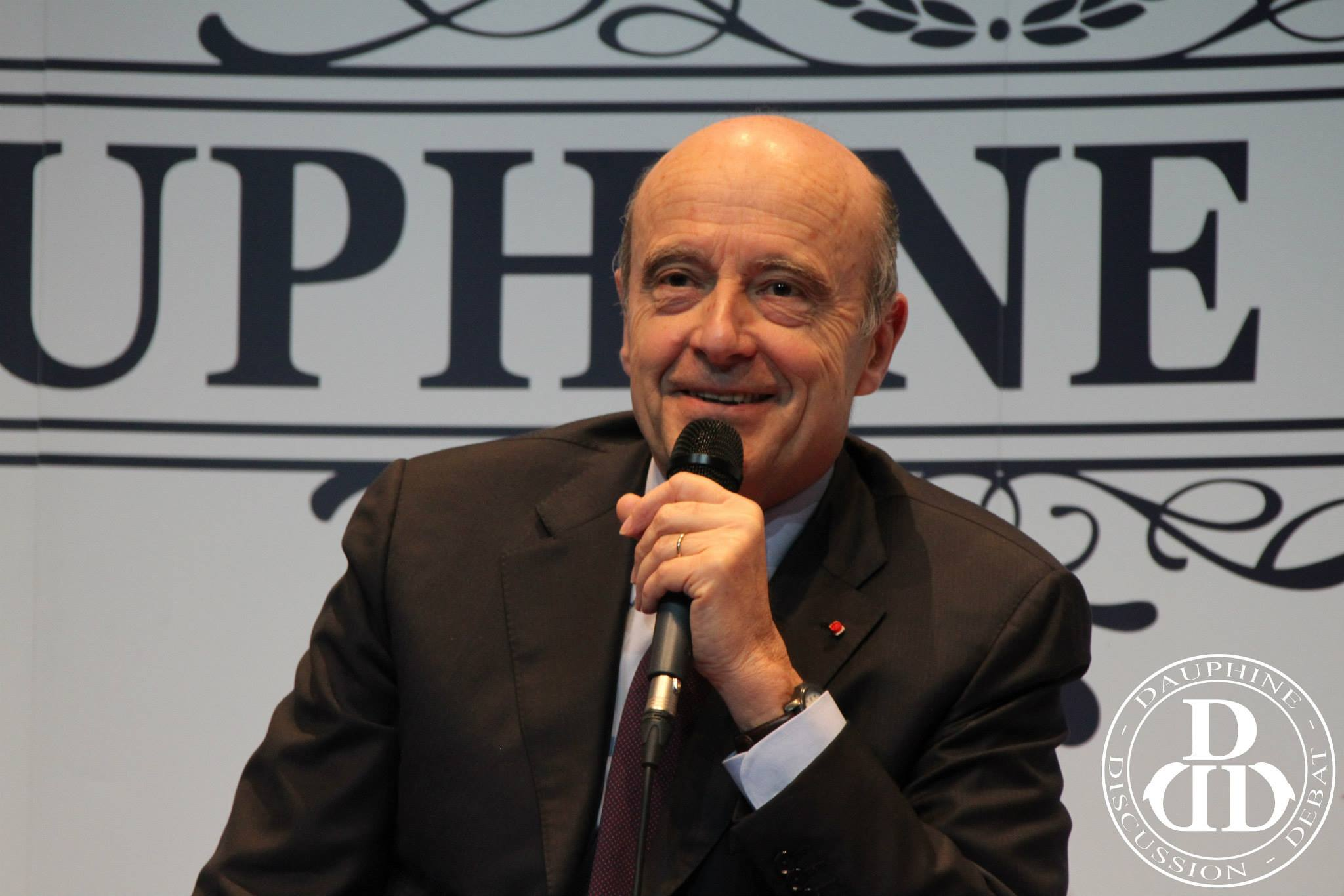 Alain Juppé à l'Université Paris-Dauphine